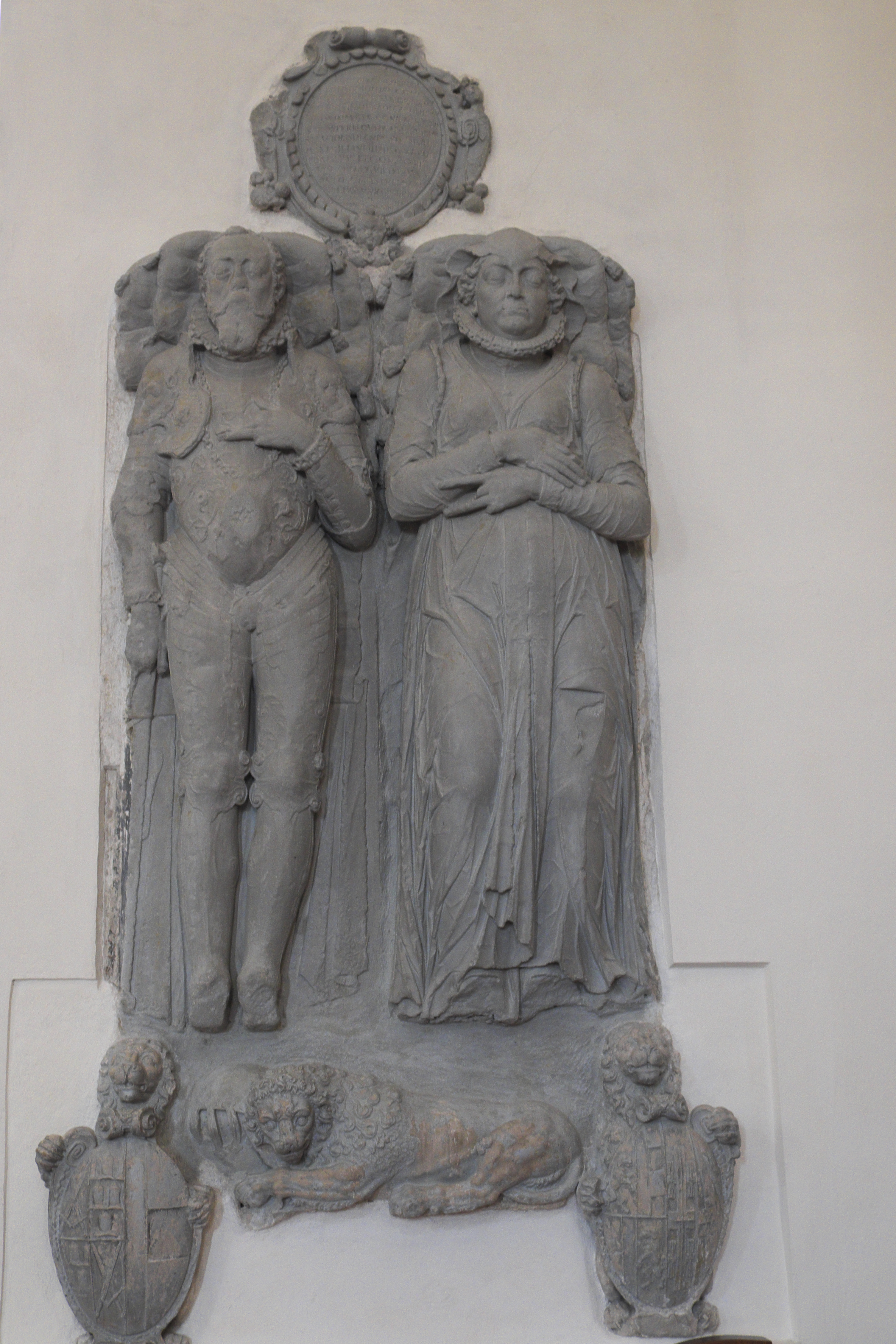 Katholische Pfarrkirche Mariä Himmelfahrt in Engen im Landkreis Konstanz (Baden-Württemberg/Deutschland), Renaissance-Epitaph für Conrad von Pappenheim († 1603) und seiner Gemahlin Catharina von Lamberg († 1597), von Hans Morinck